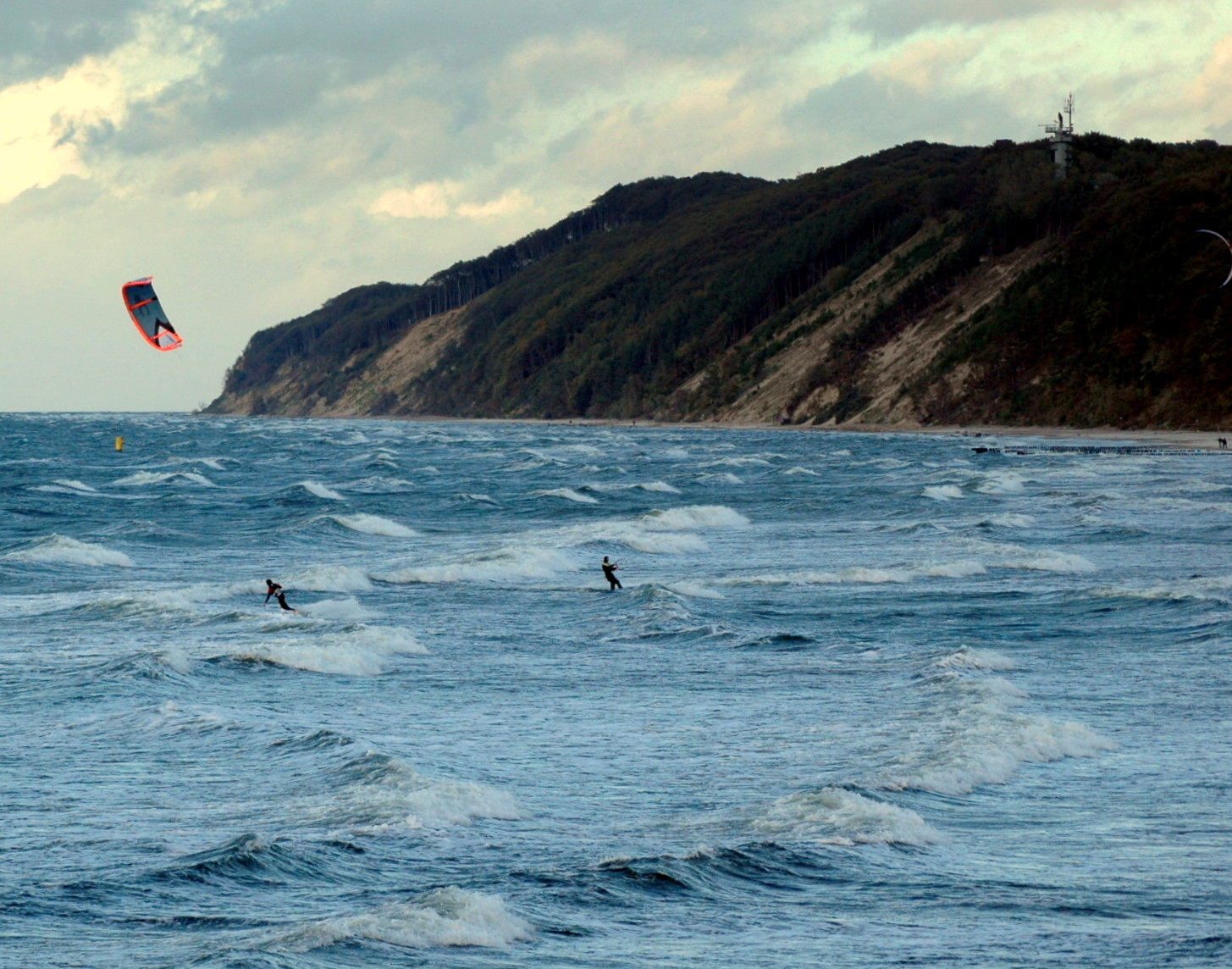 Kitesurfingowcy w Międzyzdrojach